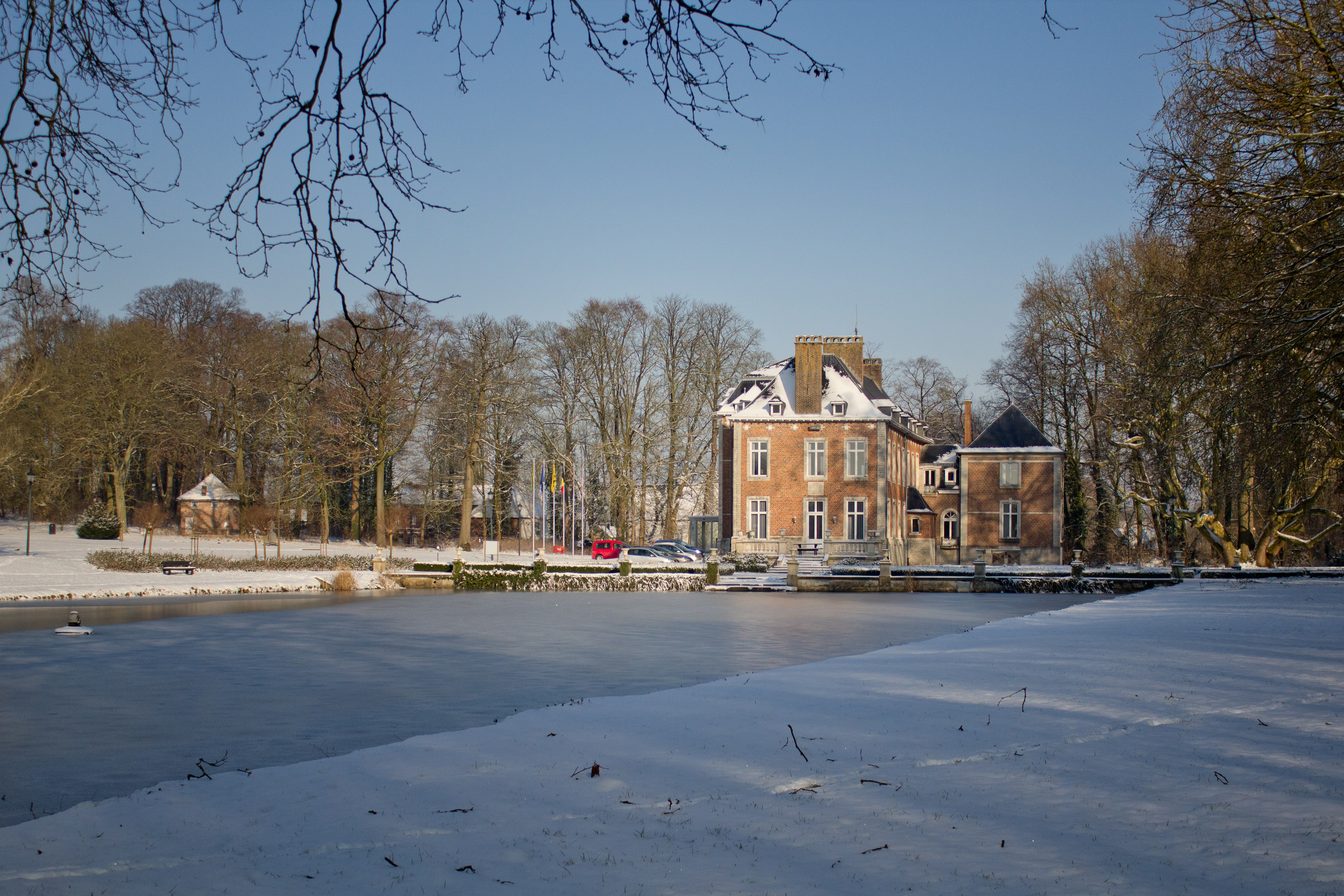 Kasteel Kwabeek te Vertrijk, gezien vanaf de zijkant.